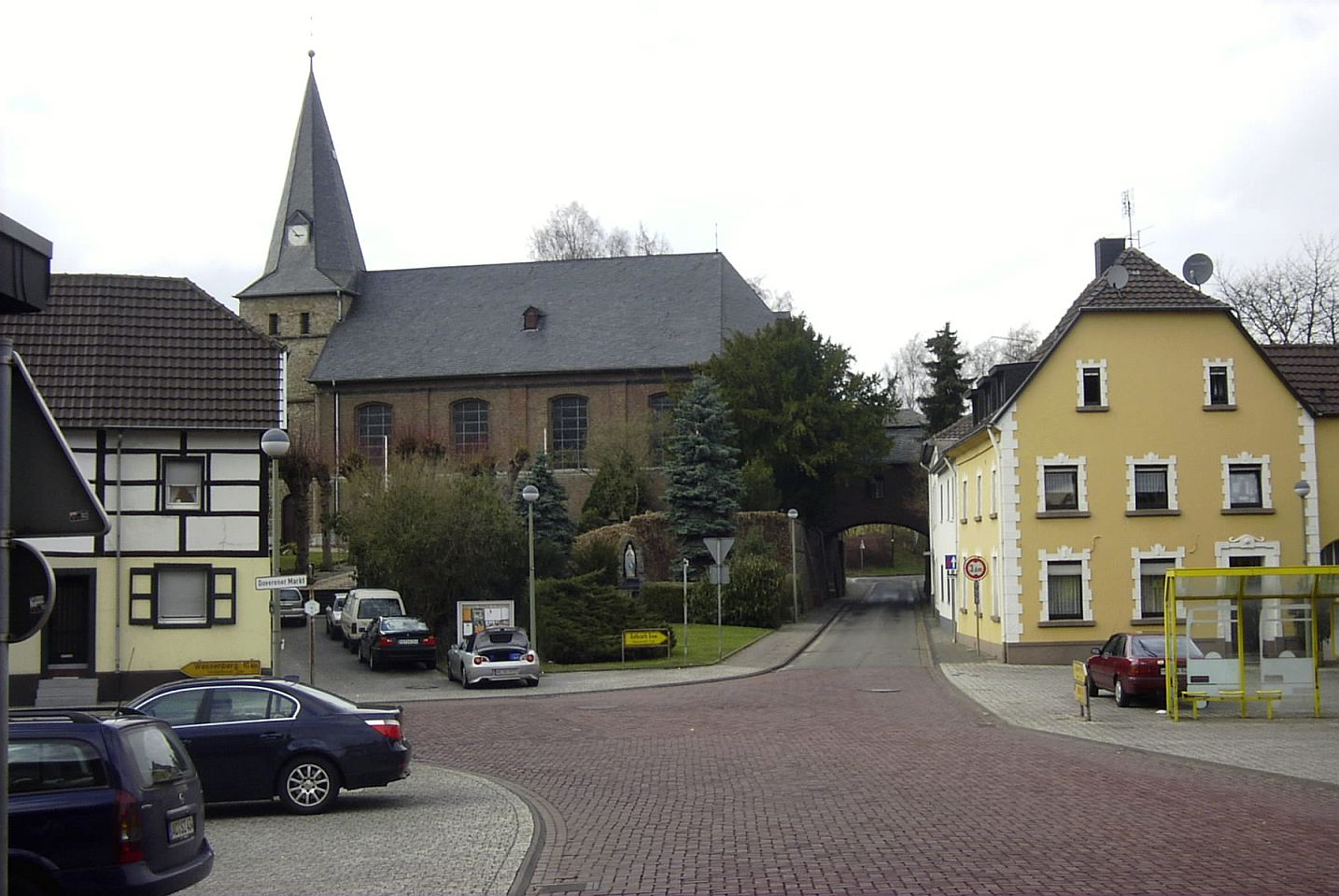 Summary Bildbeschreibung: katholische Pfarrkirche St. Dionysius in Hückelhoven-Doveren Quelle: eigenes Foto Fotograf/Zeichner: bodoklecksel Datum: März 2006 Sonstiges: siehe Beschreibung im Artikel Doveren